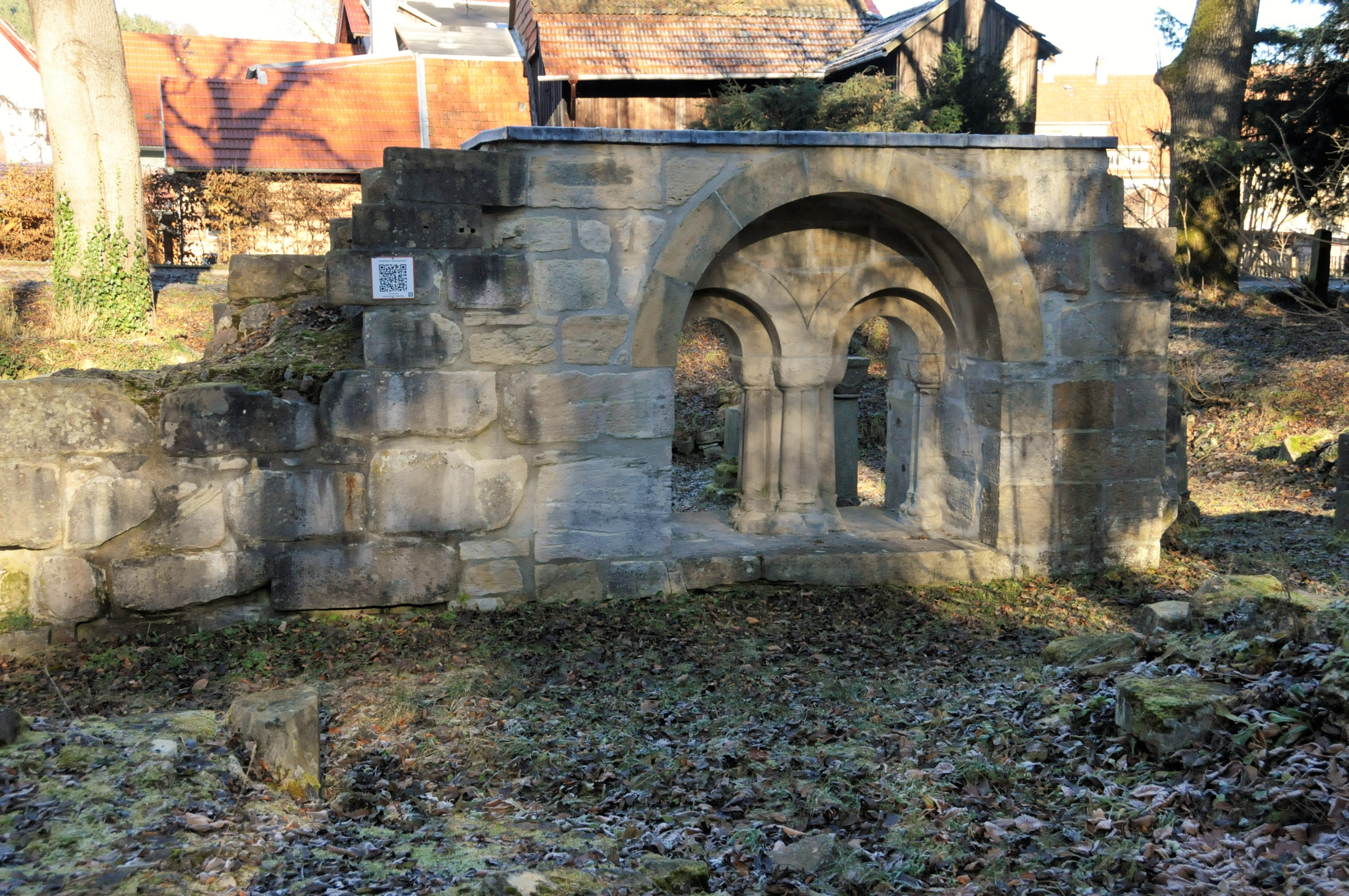 Kloster Georgenthal, Grabungsbefunde, Überrest der ehem. Basilika